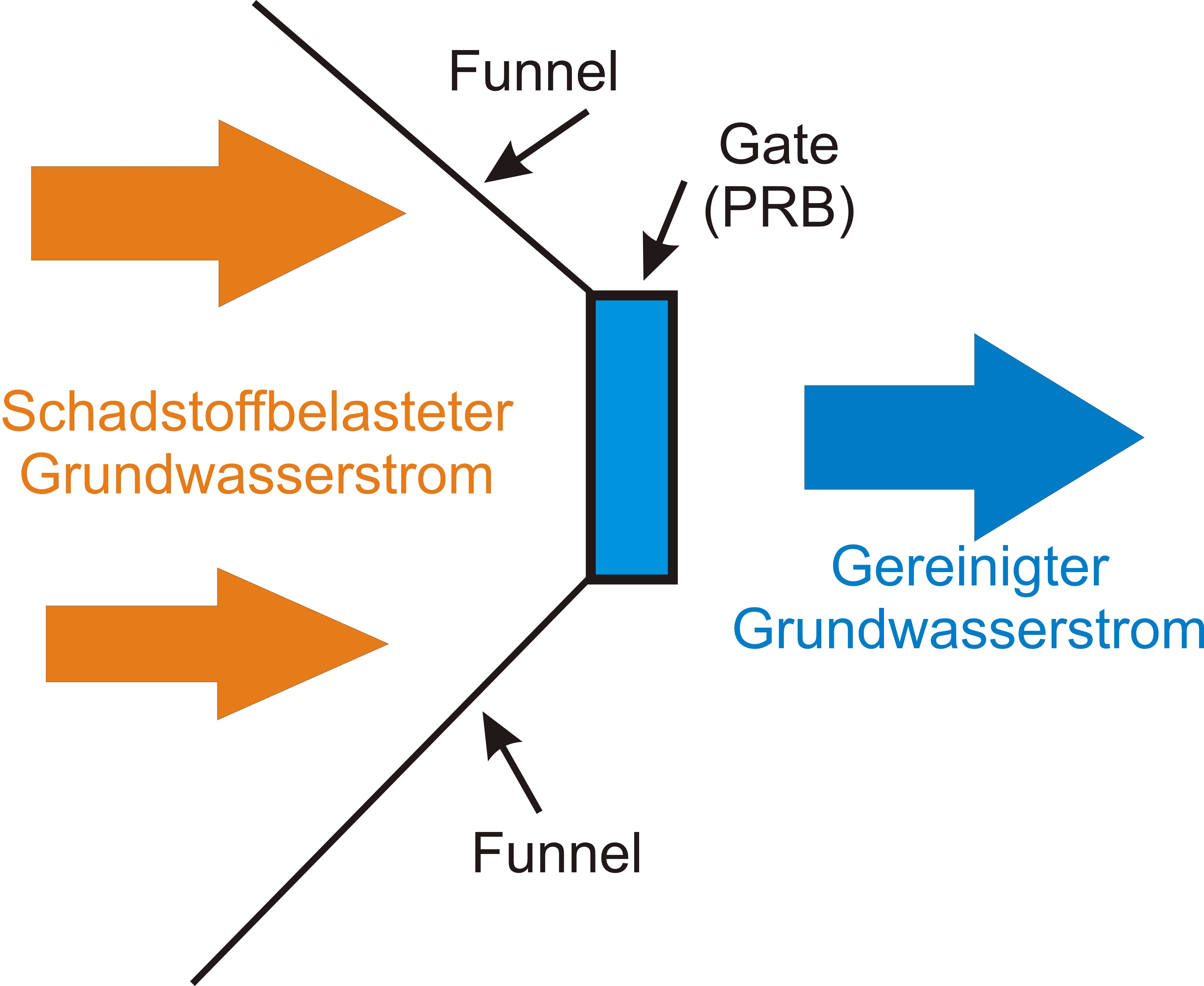 Sammeln eines belasteten Grundwasserstroms mit Barrieren (Funnel) und Zuleitung zu einem Gate zur Reduzierung der Schadstoffe.